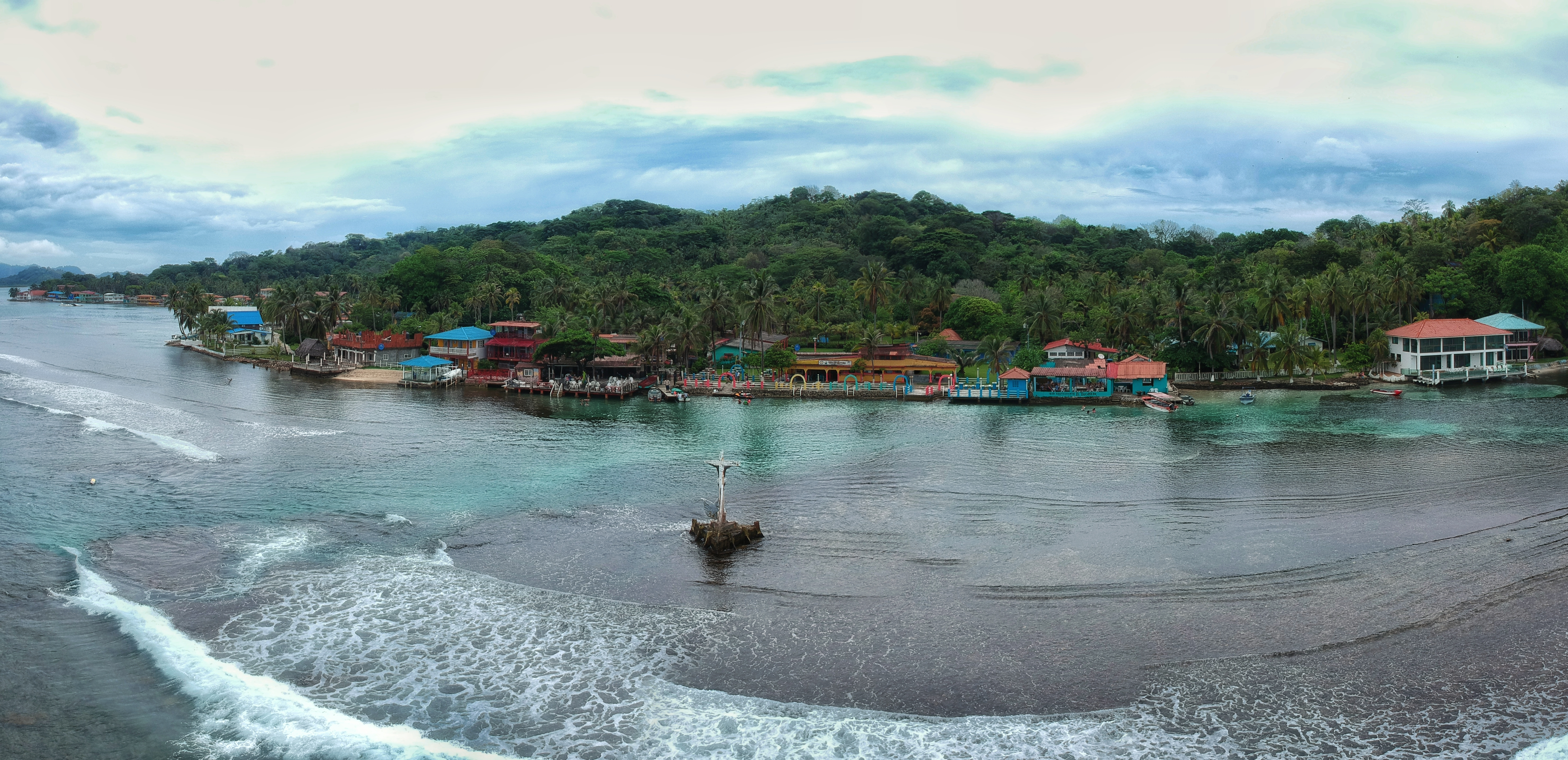 Fotografía aérea del cristo negro en Isla Grande, Colón, Panamá.